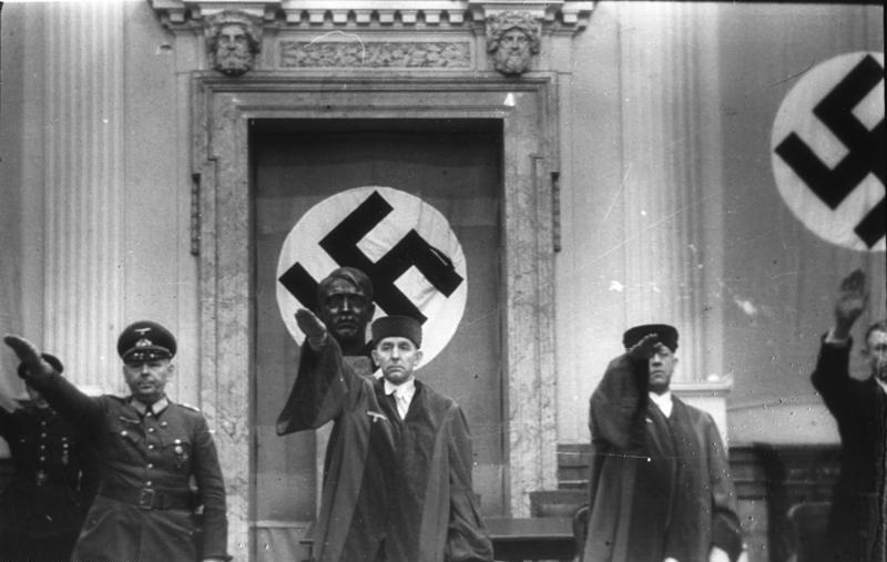 Volksgerichtshof, Reinecke, Freisler, Lautz Berlin - Volksgerichtshof, Prozeß nach dem 20. Juli 1944; v.l.n.r.: Hermann Reinecke, Roland Freisler, Ernst Lautz Abgebildete Personen: Reinecke, Hermann: General der Infanterie, Ritterkreuz (RK), Heer, Beisitzer Prozeß 20.Juli 1944, Deutschland (GND 133719561) Freisler, Roland: Präsident des Volksgerichtshofes, Deutschland Lautz, Ernst: Oberreichsanwalt am Volksgerichtshof, Deutschland